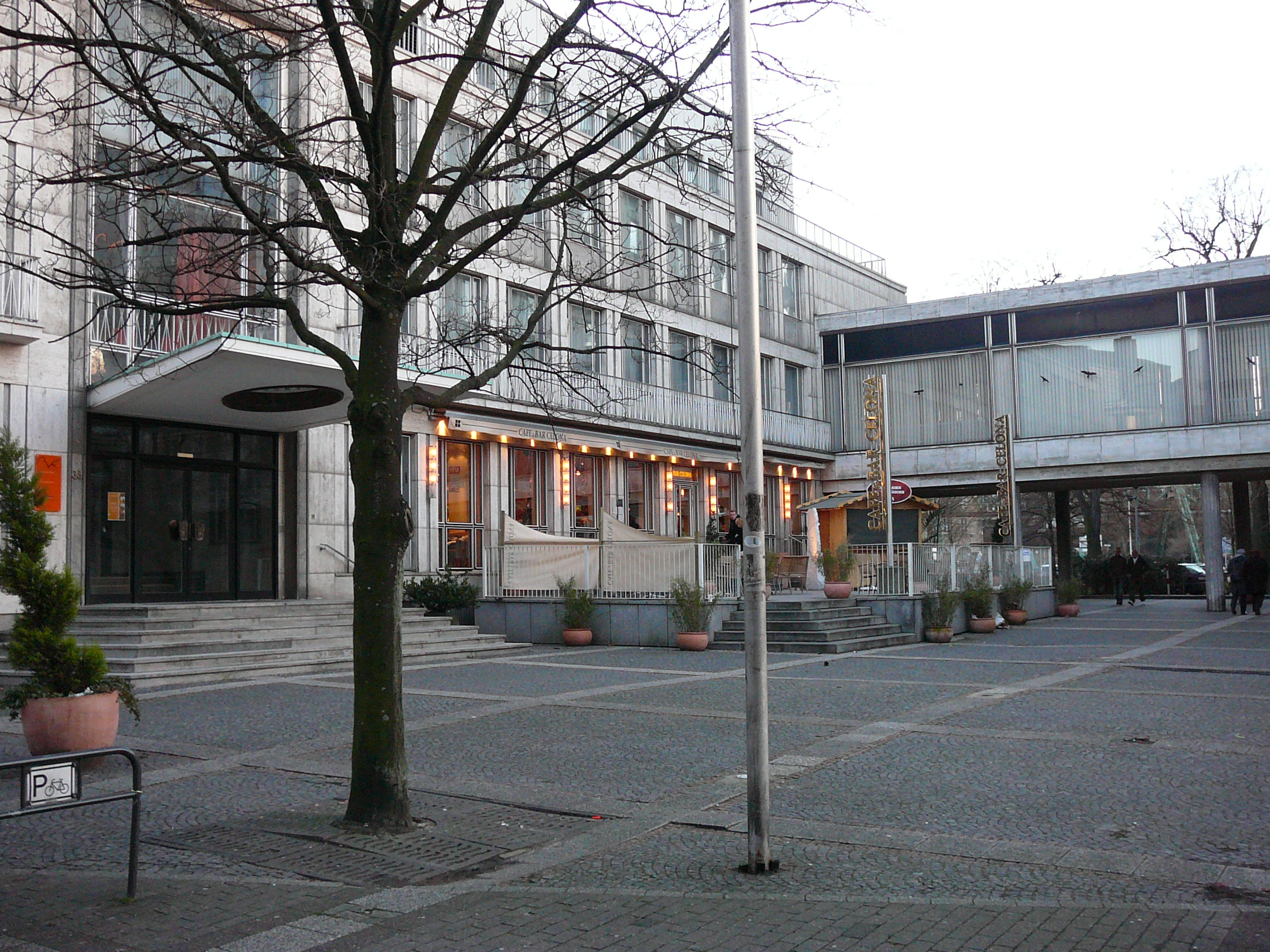 Herzogstraße, Wuppertal